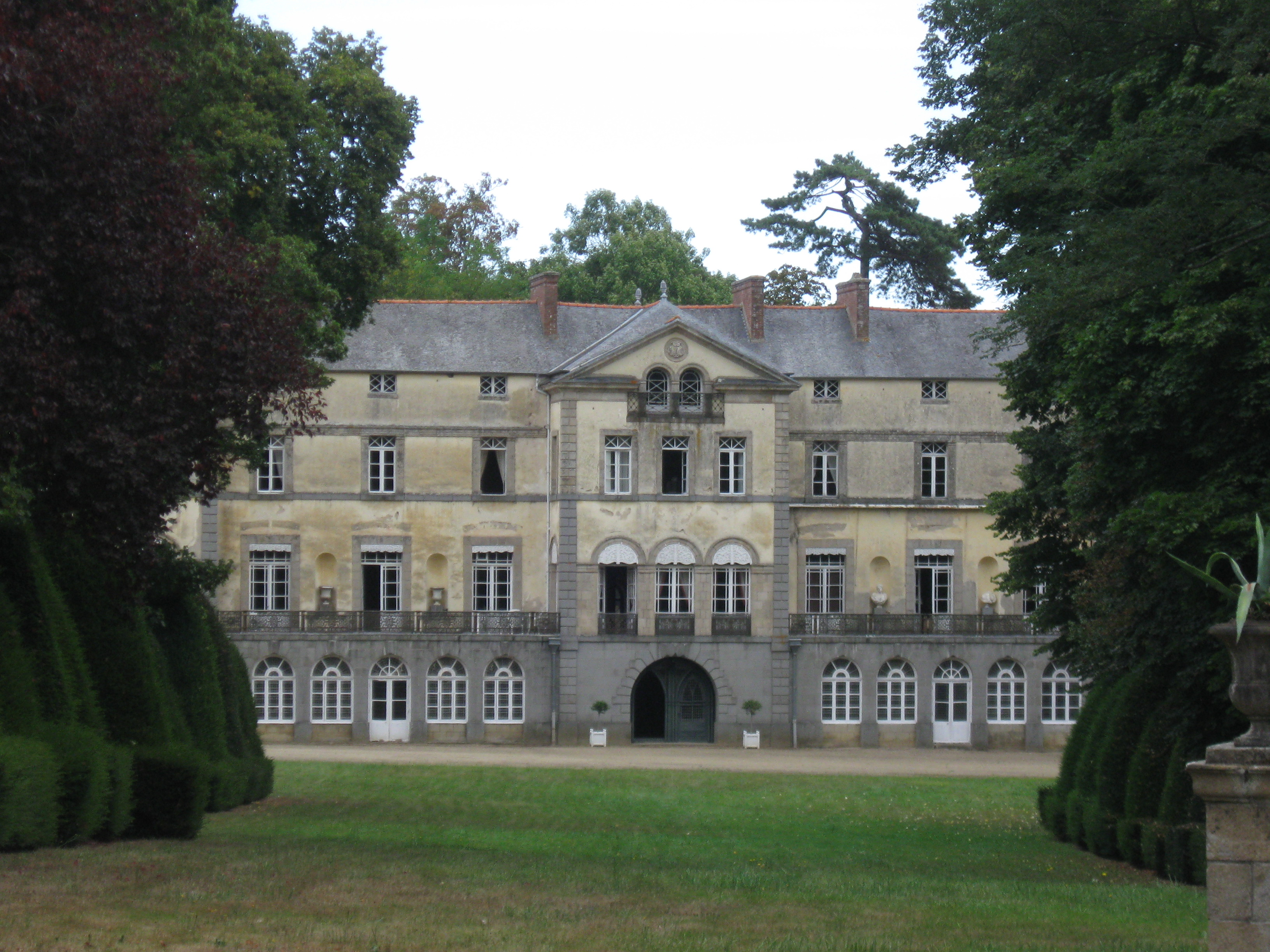 Château de Largentaye ou l'Argentaye. (Saint-Lormel, Côtes-d'Armor, région Bretagne).